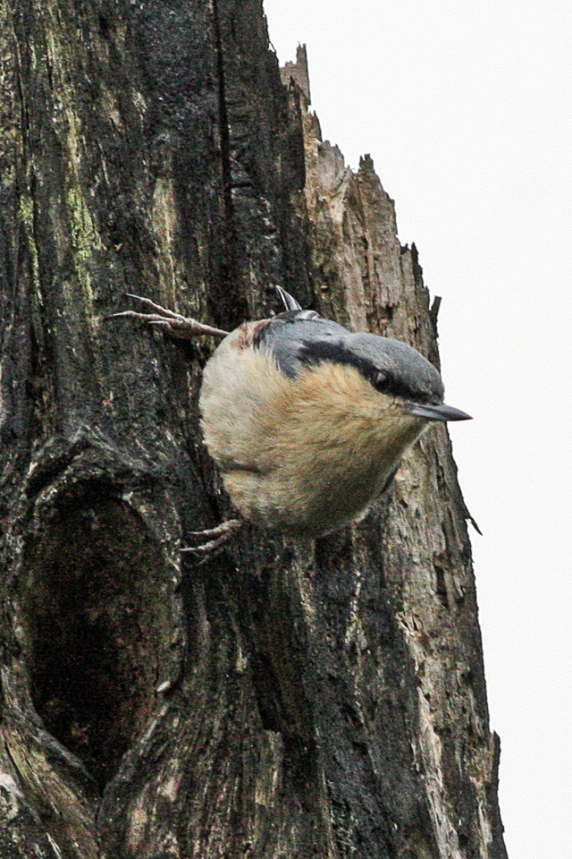 Sitta nagaensis montium in Wawu Shan, Sichuan